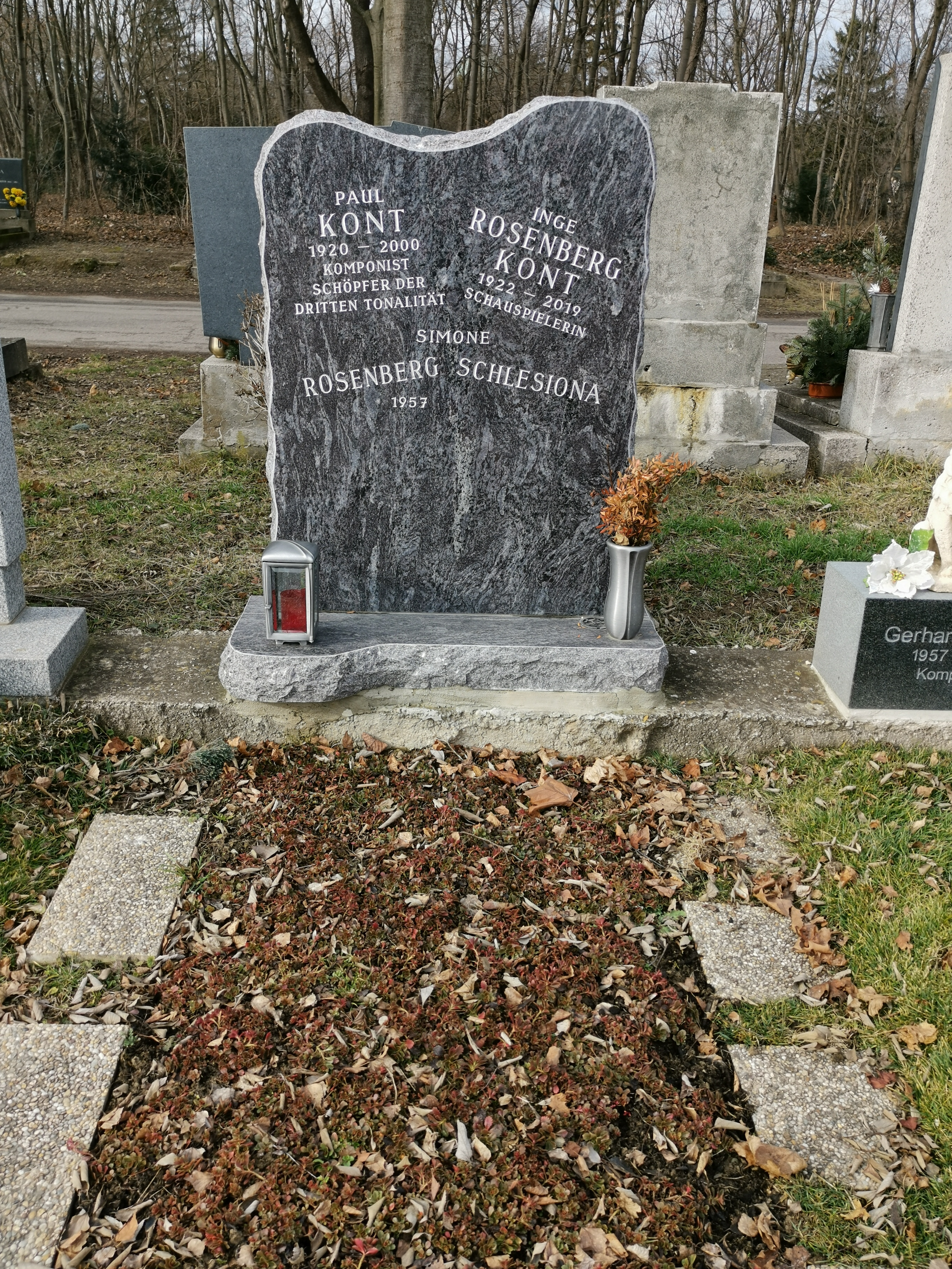 Grab von Paul Kont und Inge Rosenborg Kont auf dem Wiener Zentralfriedhof